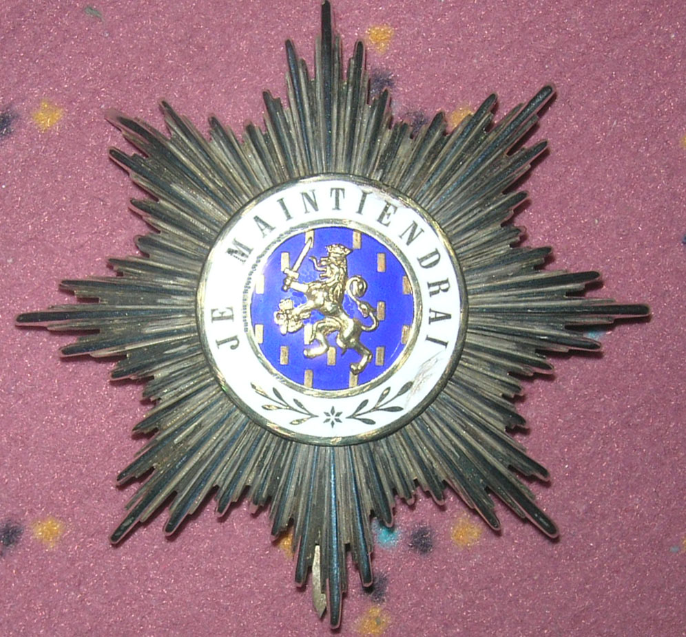 Bijou vum Ordre d'Orange-Nassau